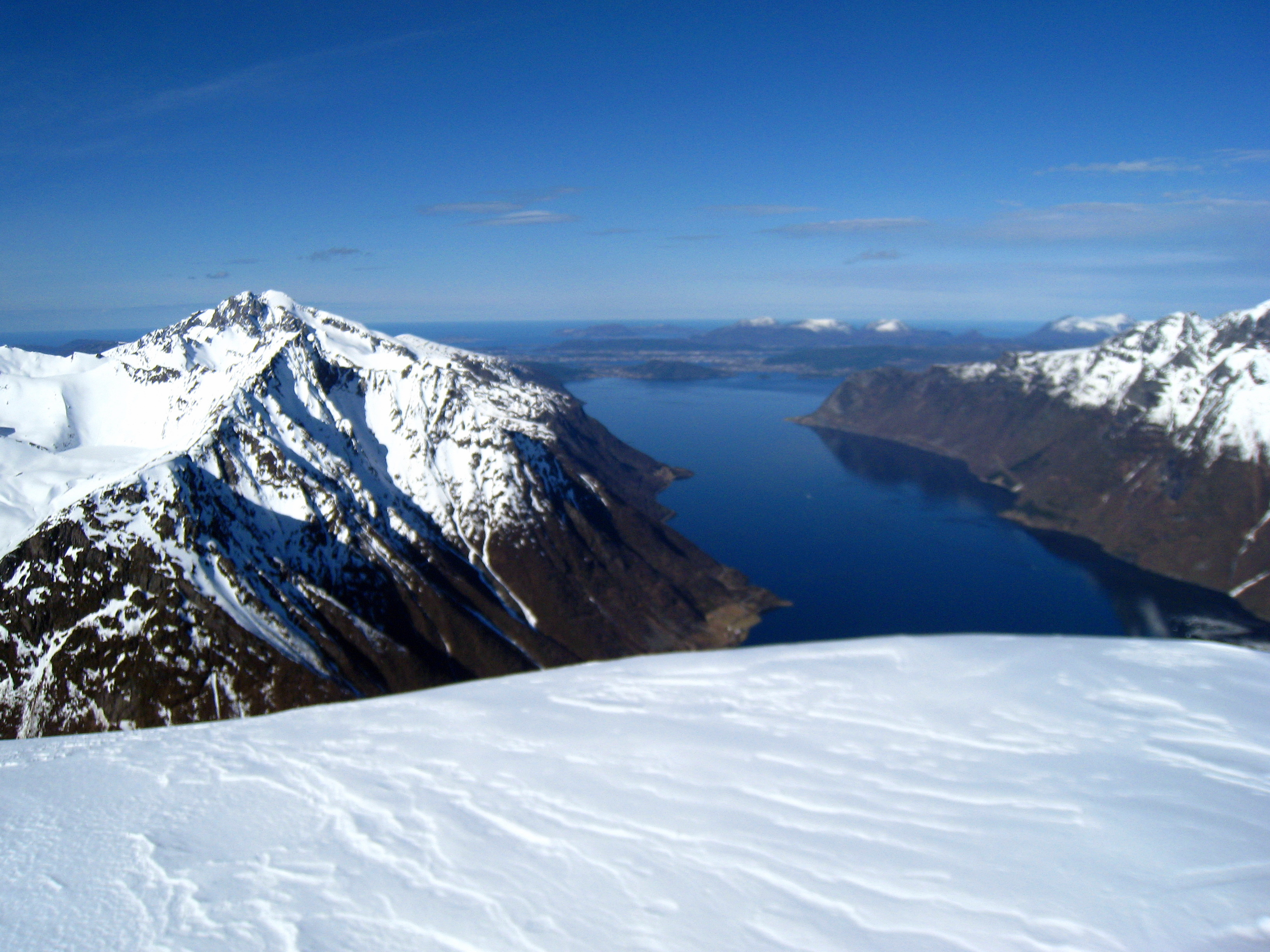 Utsyn utover Hjørundfjorden mot Ålesund